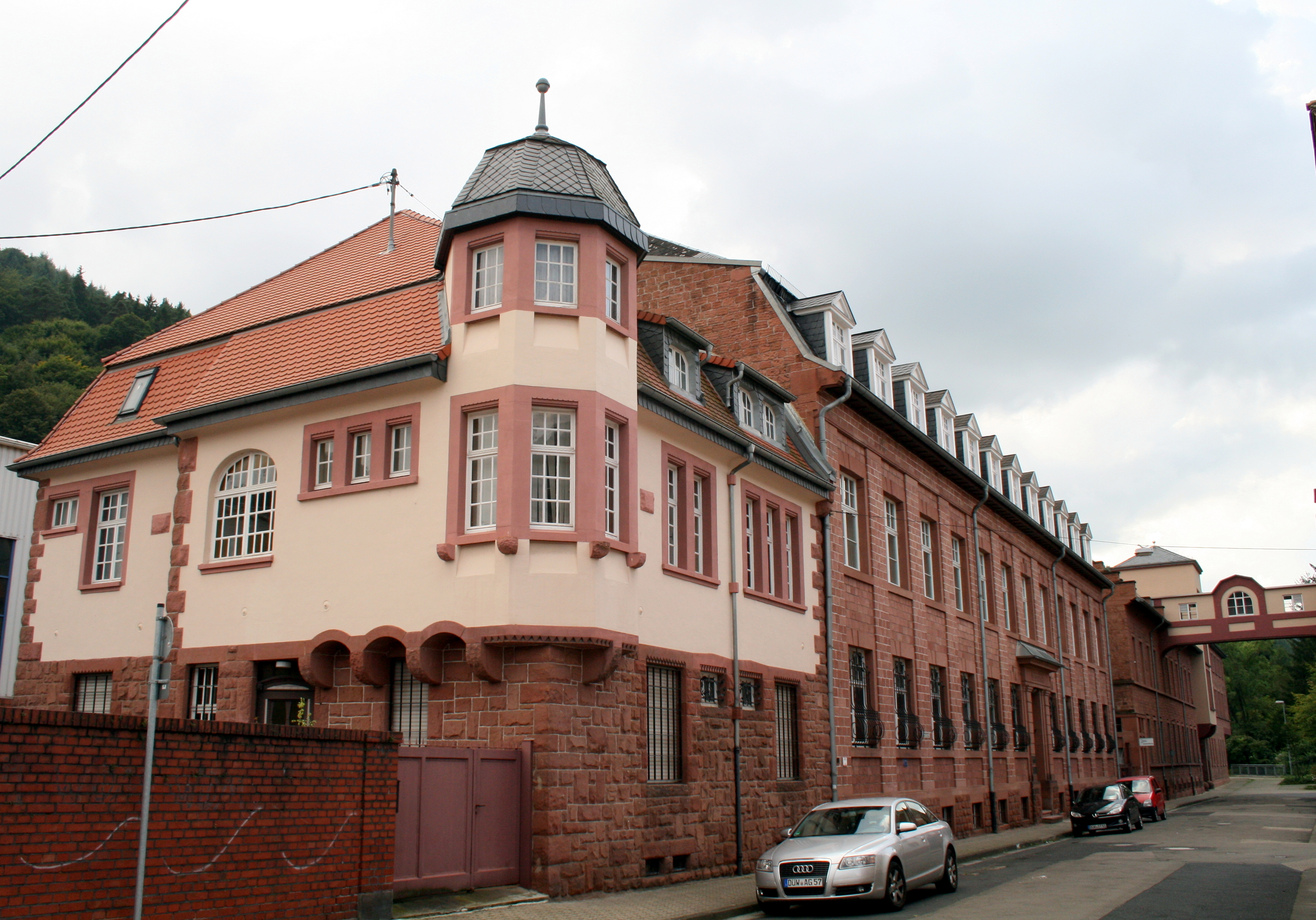 Denkmalzone Ehemalige Tuchfabrik Gebrüder Haas, Fabrikgebäude, dreigeschossiger Sandsteinbau, 1883, Erweiterungen 1888 und 1889; ehemaliges Schlachthaus, 1889, Erweiterung und Torbau 1950; Flügel mit übergiebeltem Treppenhaus um 1900, Erweiterung 1920; villenartiges Wohnhaus, Heimatstil mit Neurenaissancemotiven, um 1910